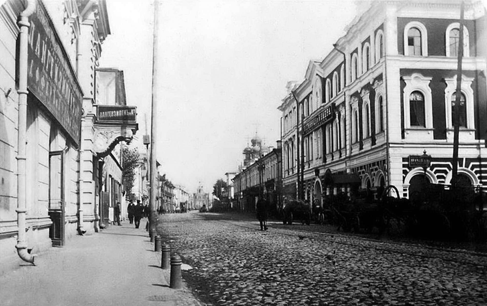 Улица Рождественская в конце XIX века